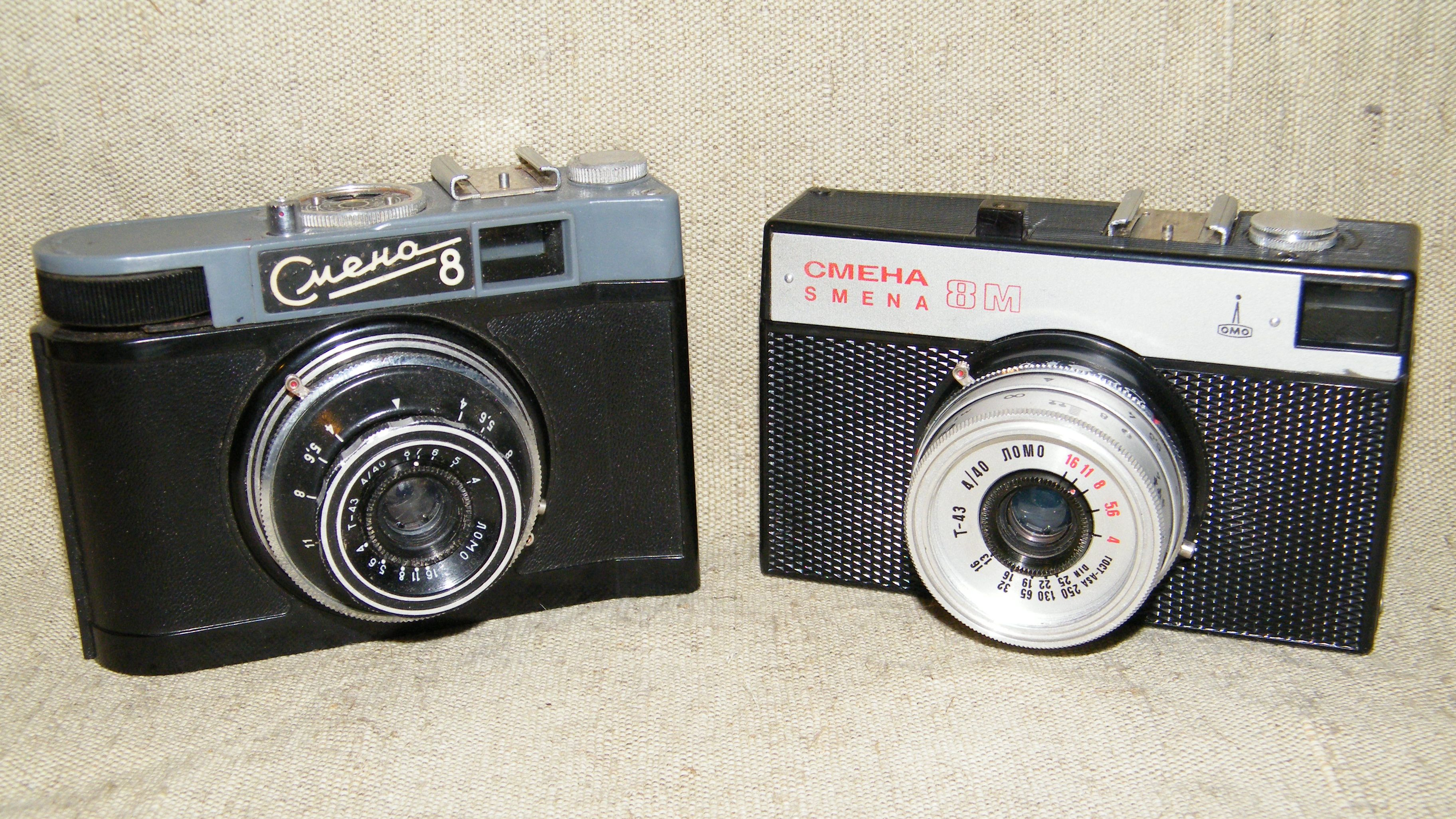 Smena 8 Smena 8M